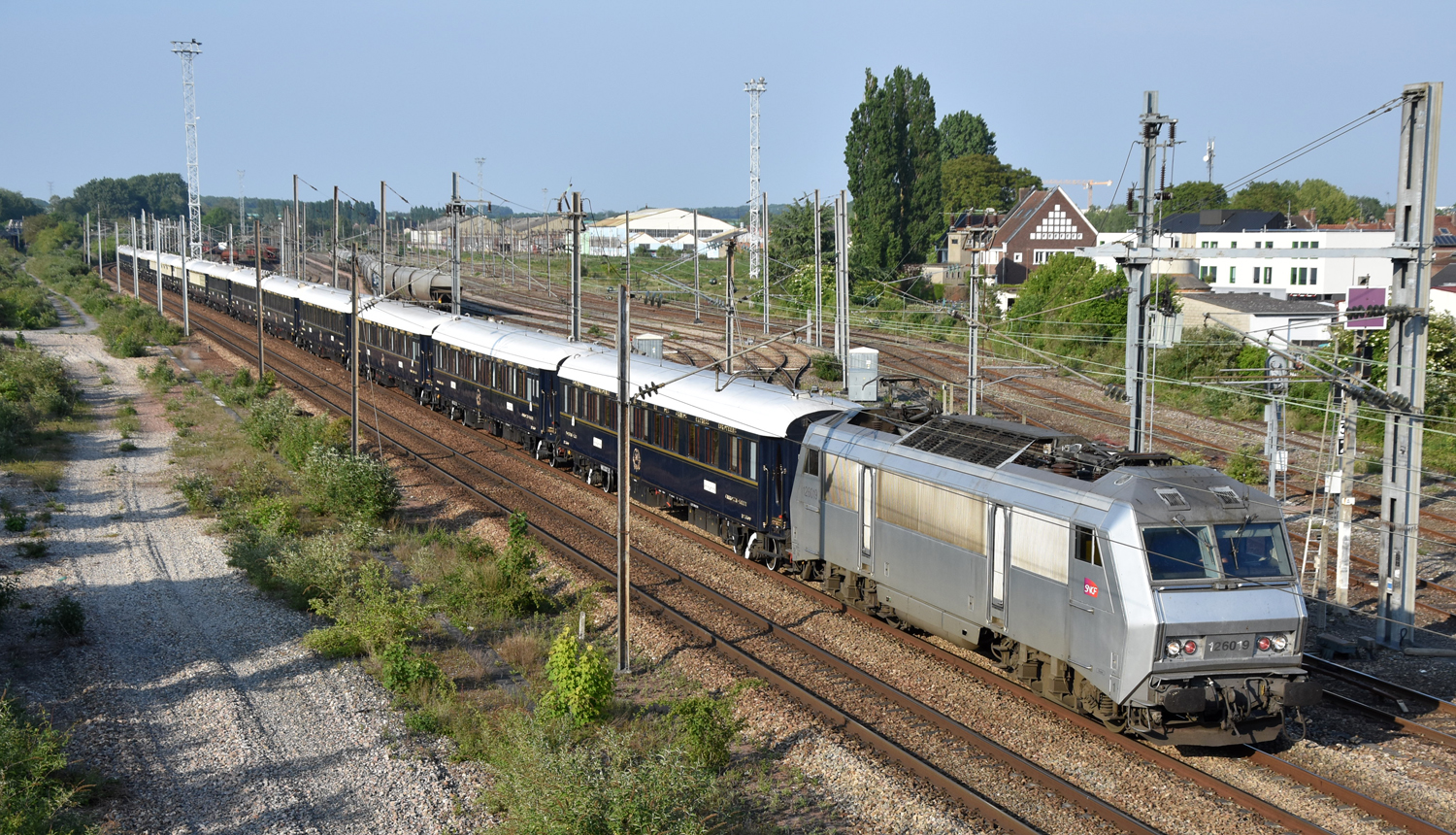 BB 26019 et le Venise Simplon Orient-Express direction de Paris prise au niveau du "relais Paris" à Longueau